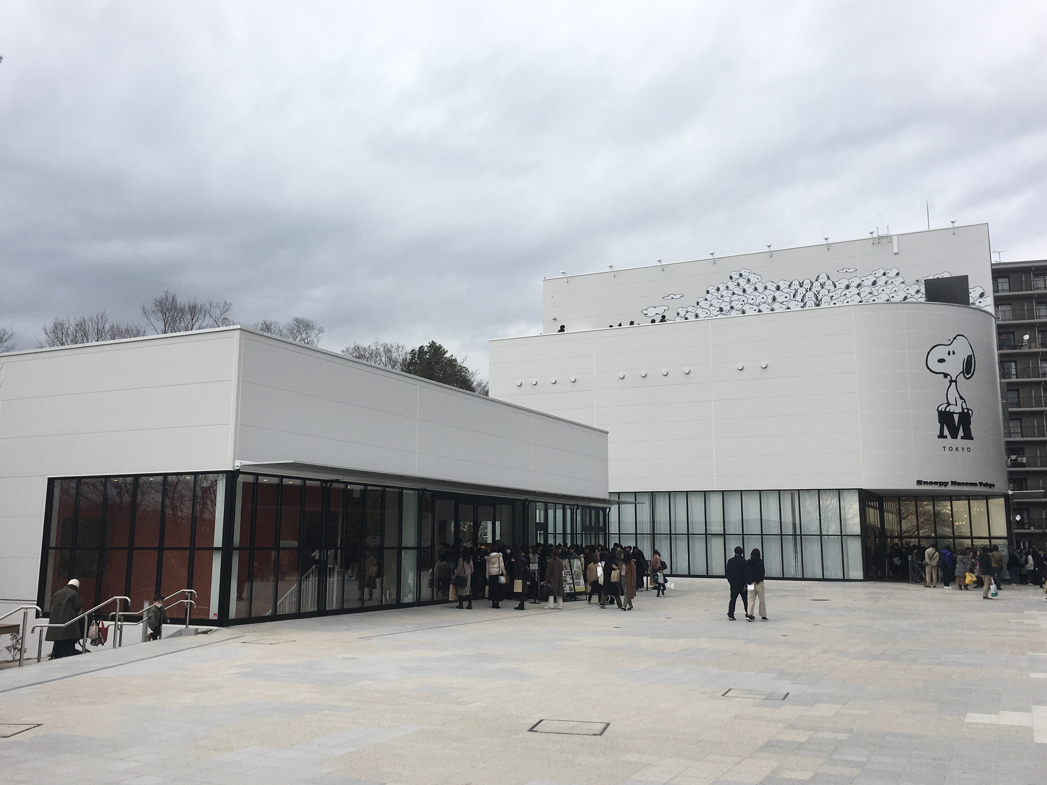 南町田グランベリーパーク内にオープンしたスヌーピーミュージアムとミュージアムのカフェ「PEANUTS Cafe（ピーナッツカフェ）」。